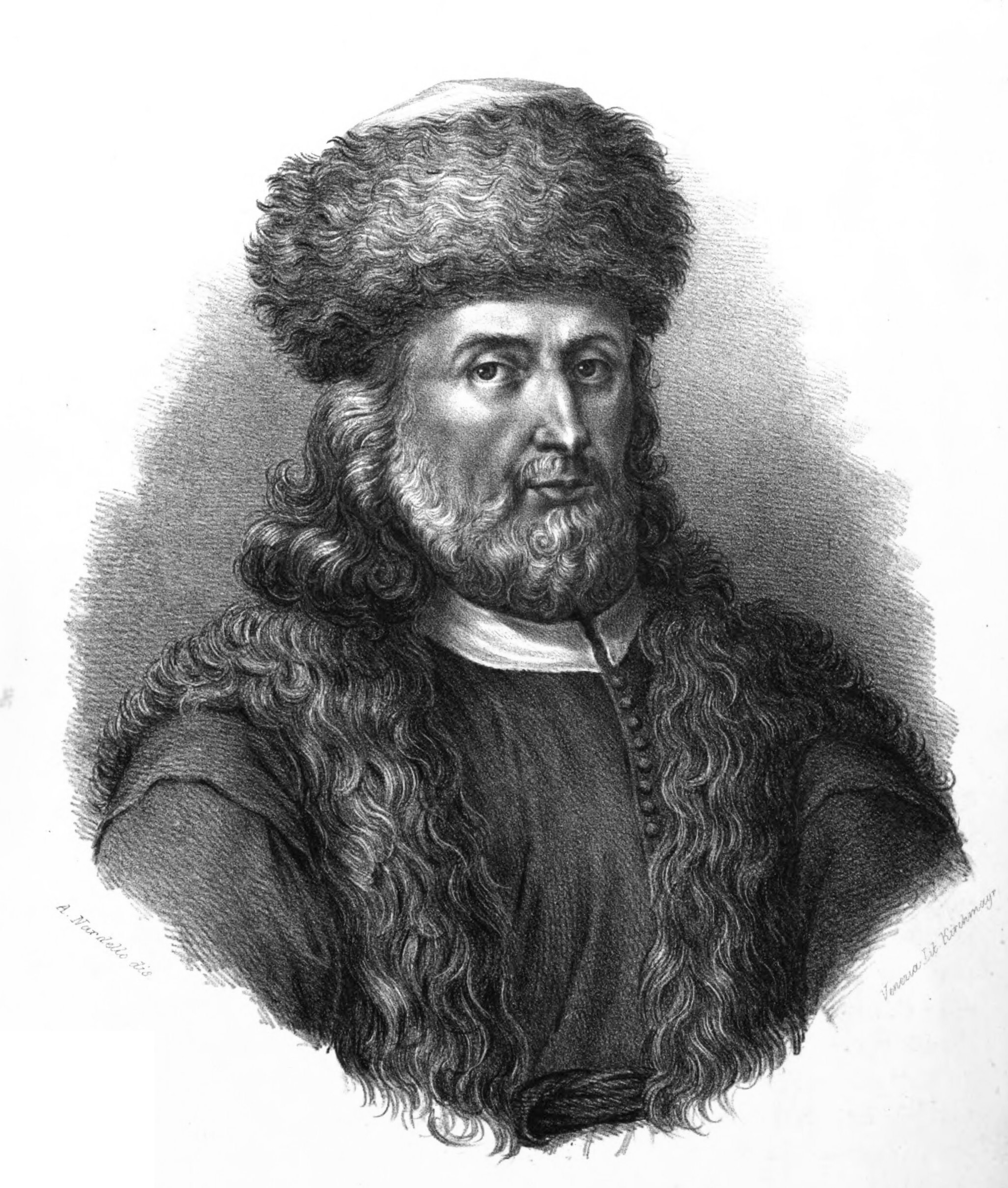 retrato de Marino de Caboga